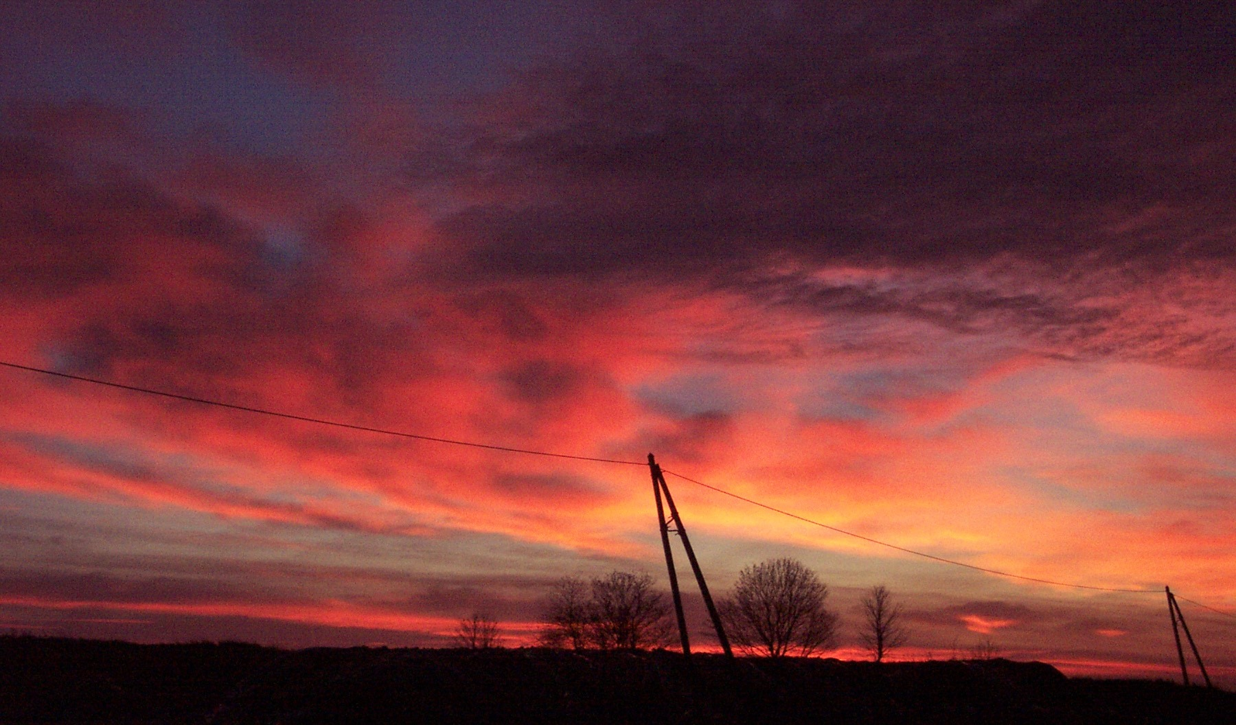 cliché personnel. Aucun filtre. Aucune retouche. Restitution assez fidèle de l'ambiance de ce matin d'hiver